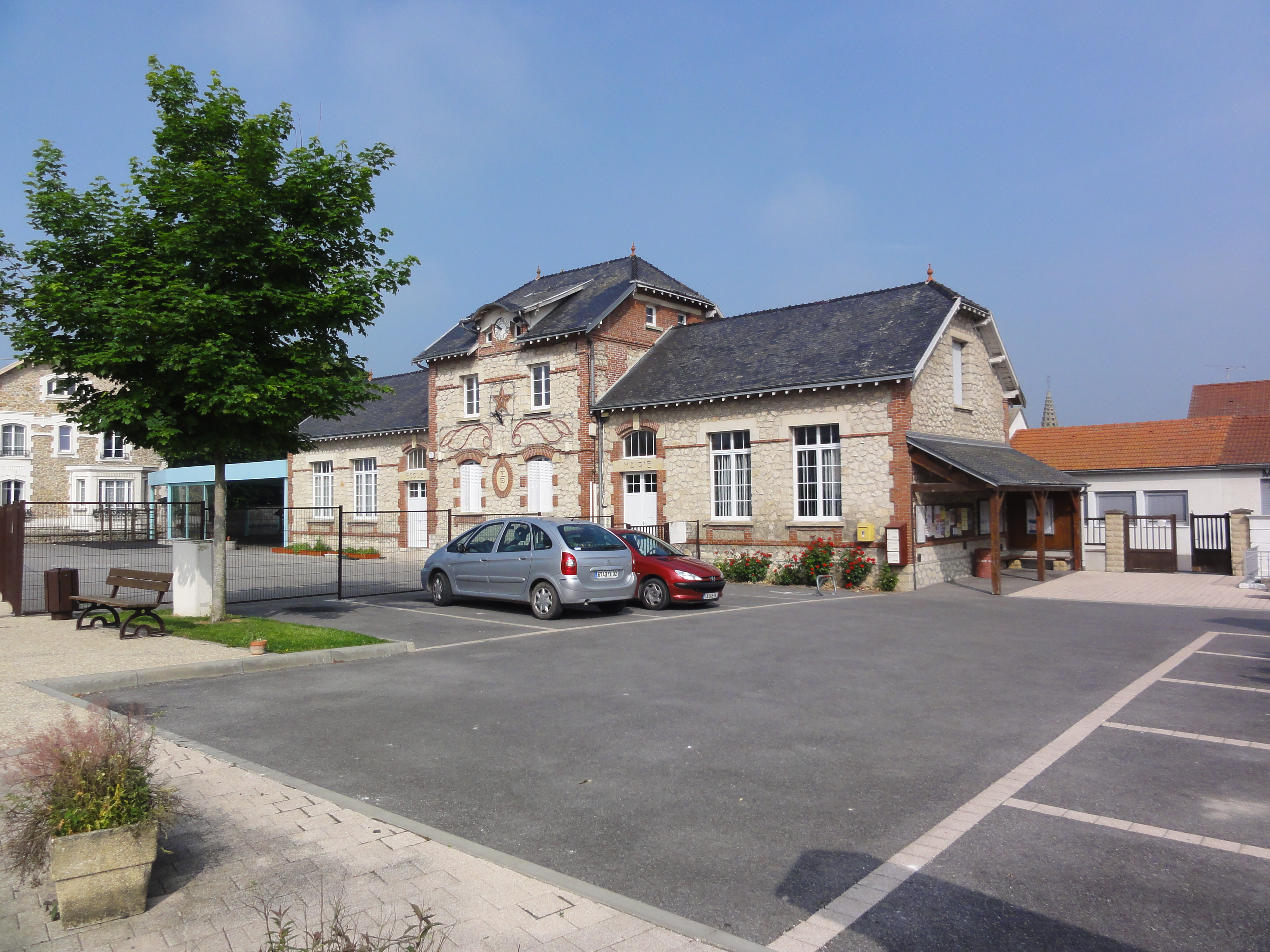 Condé-sur-Suippe (Aisne) Mairie-école